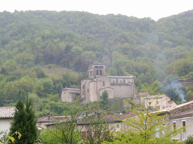 L’Église de Vion en Ardèche. L’Église (à l'exception de la nef) a été classé monument historique par arrêté du 1er avril 1910.